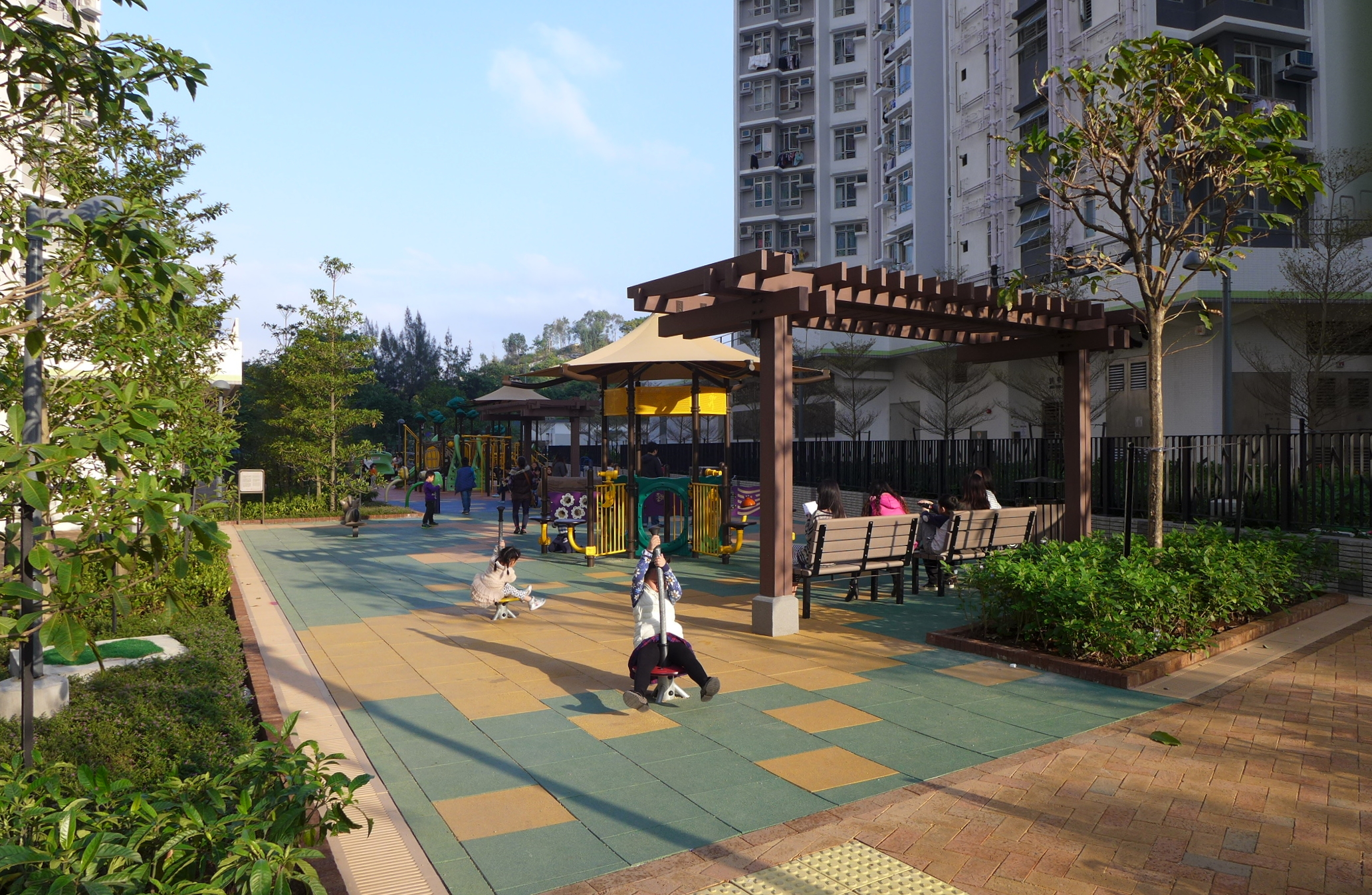 Hung Fuk Estate